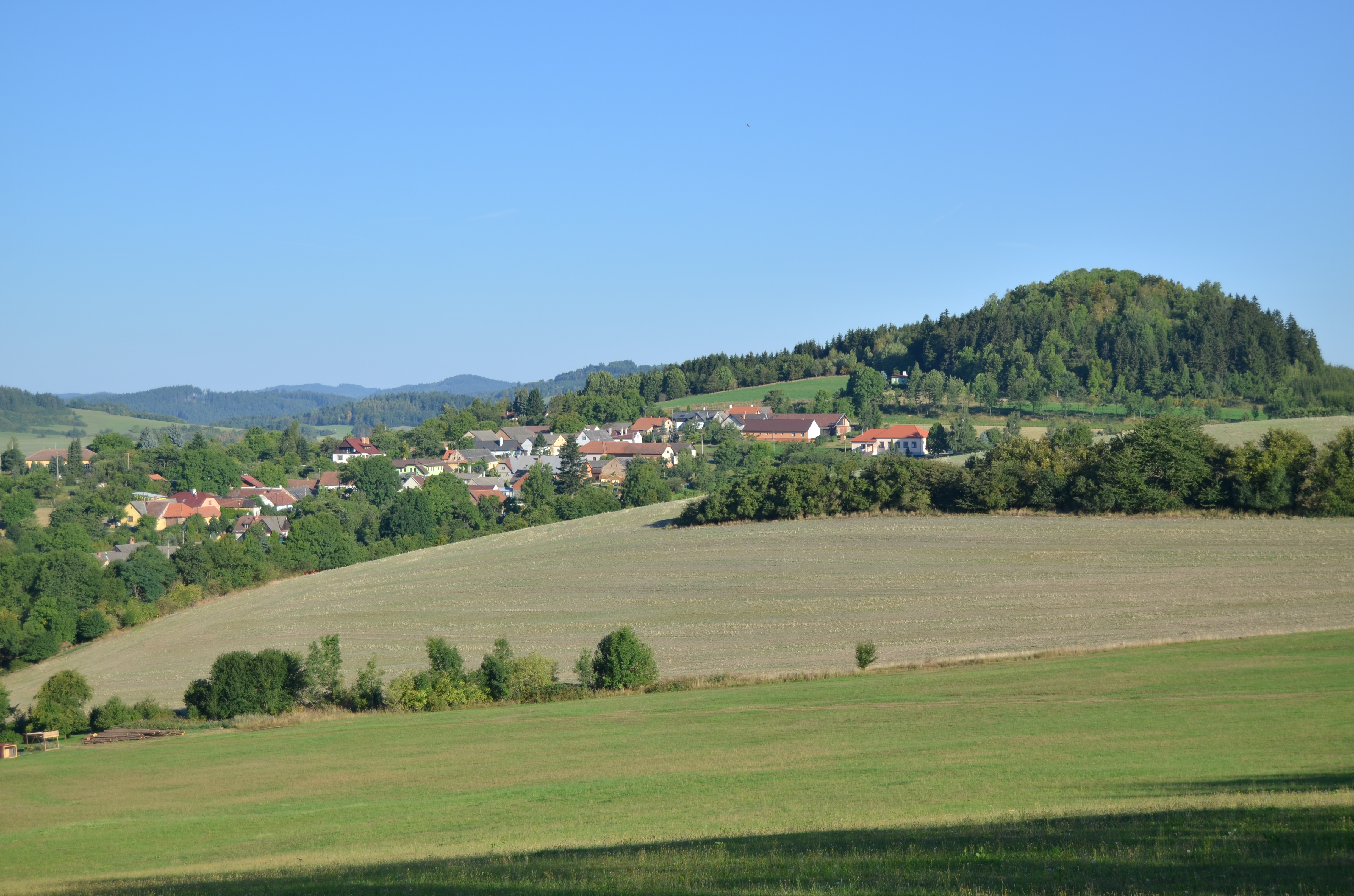 Obec Louka v okrese Blansko